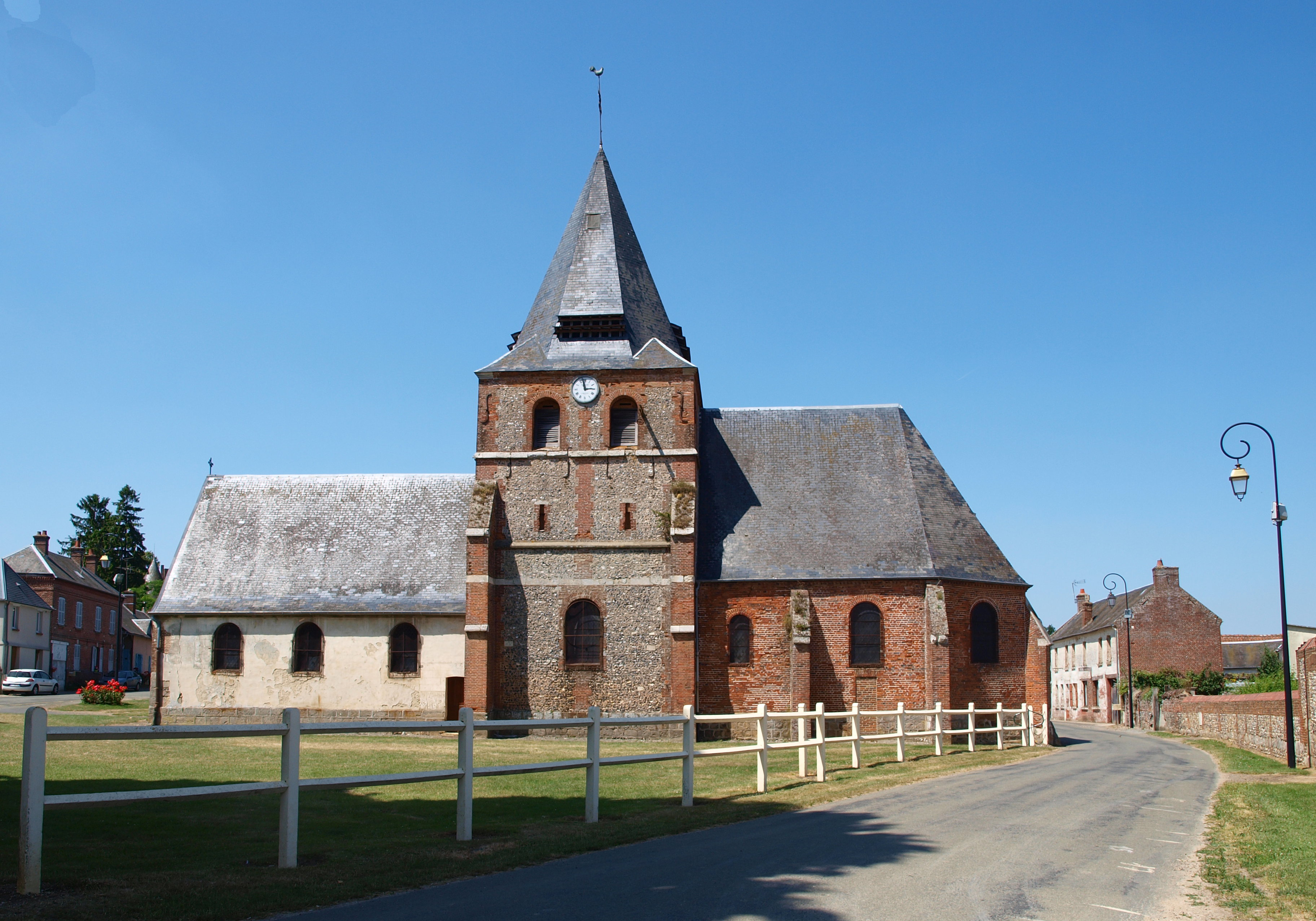 Fontaine-Lavaganne (Oise, France) ; église